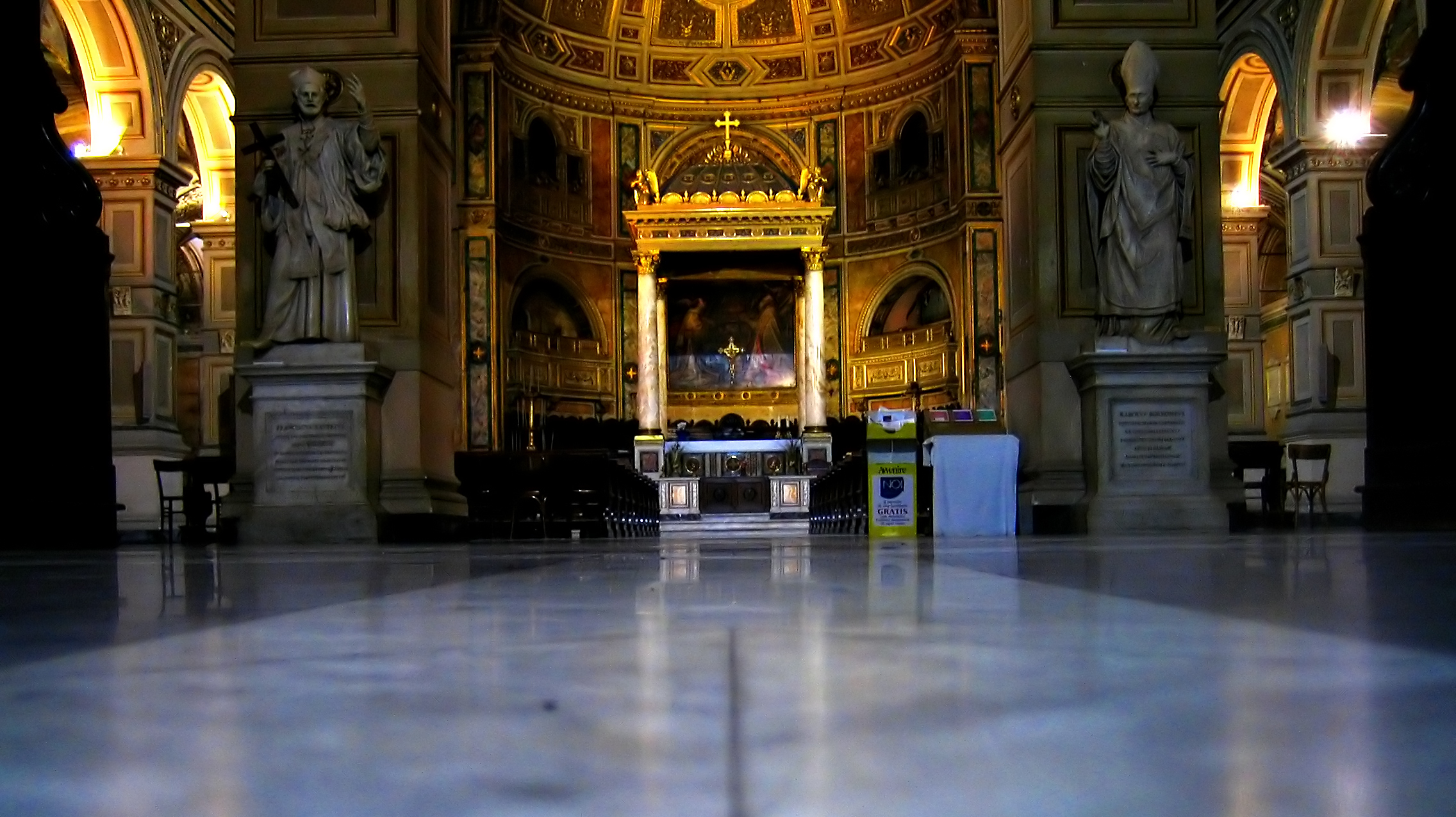 San Lorenzo inn Damaso, Roma, Italia